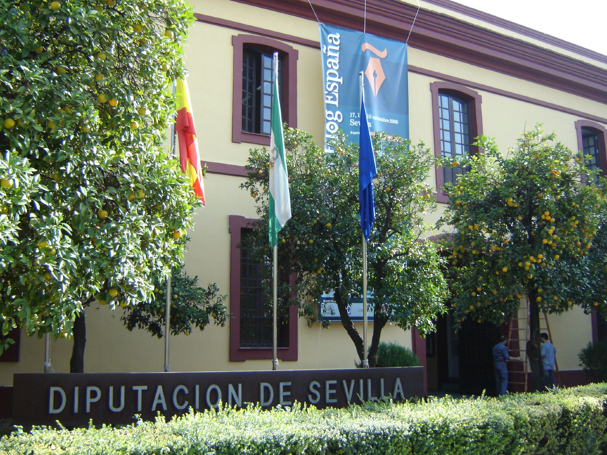 Anuncio del Evento Blog España en la fachada de la Sede del mismo, la Diputación de Sevilla.